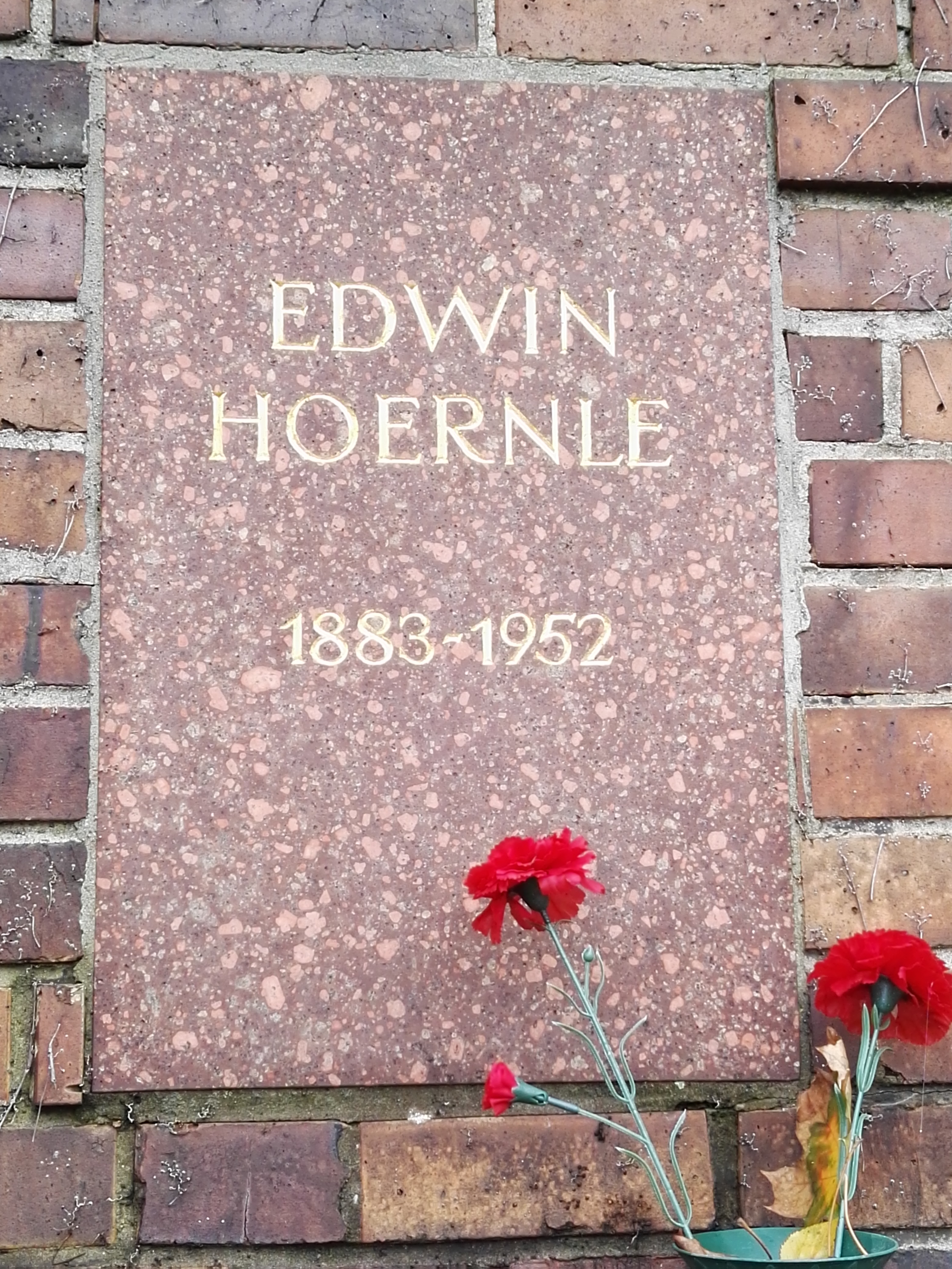 Grab von Edwin Hoernle in der Gedenkstätte der Sozialisten auf dem Zentralfriedhof Friedrichsfelde in Berlin-Lichtenberg